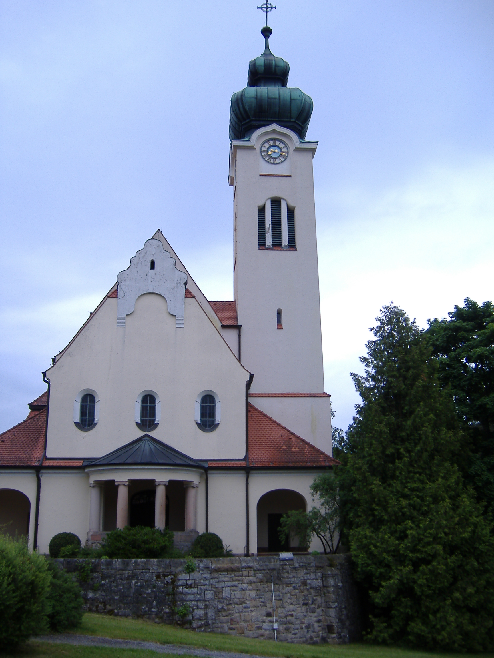 Kath. Marienkirche Staatsbad Bad Brückenau